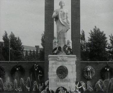 Onthulling van het monument voor Joannes Benedictus van Heutsz in Amsterdam in 1935.